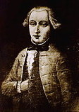 Urbanus Mabilon (Urbain Mabillot) (1744-1818), stichter van klokkengieterij Mabilon in Saarburg, Duitsland.